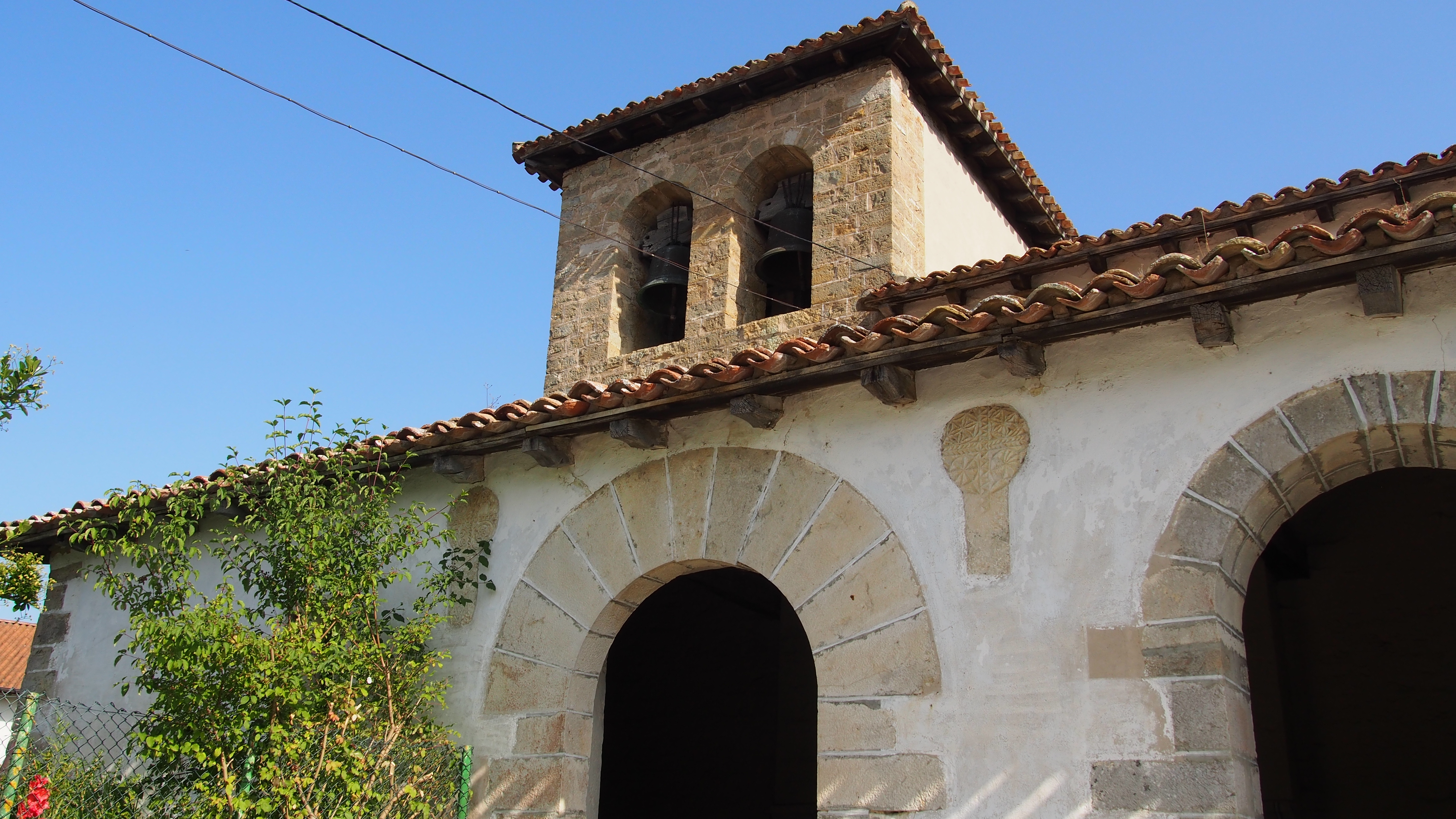 Eritze herriko elizako aurrealdea. Hormaren goikaldean, arkuen gainetik, bi hilarri txertatuta ageri dira.